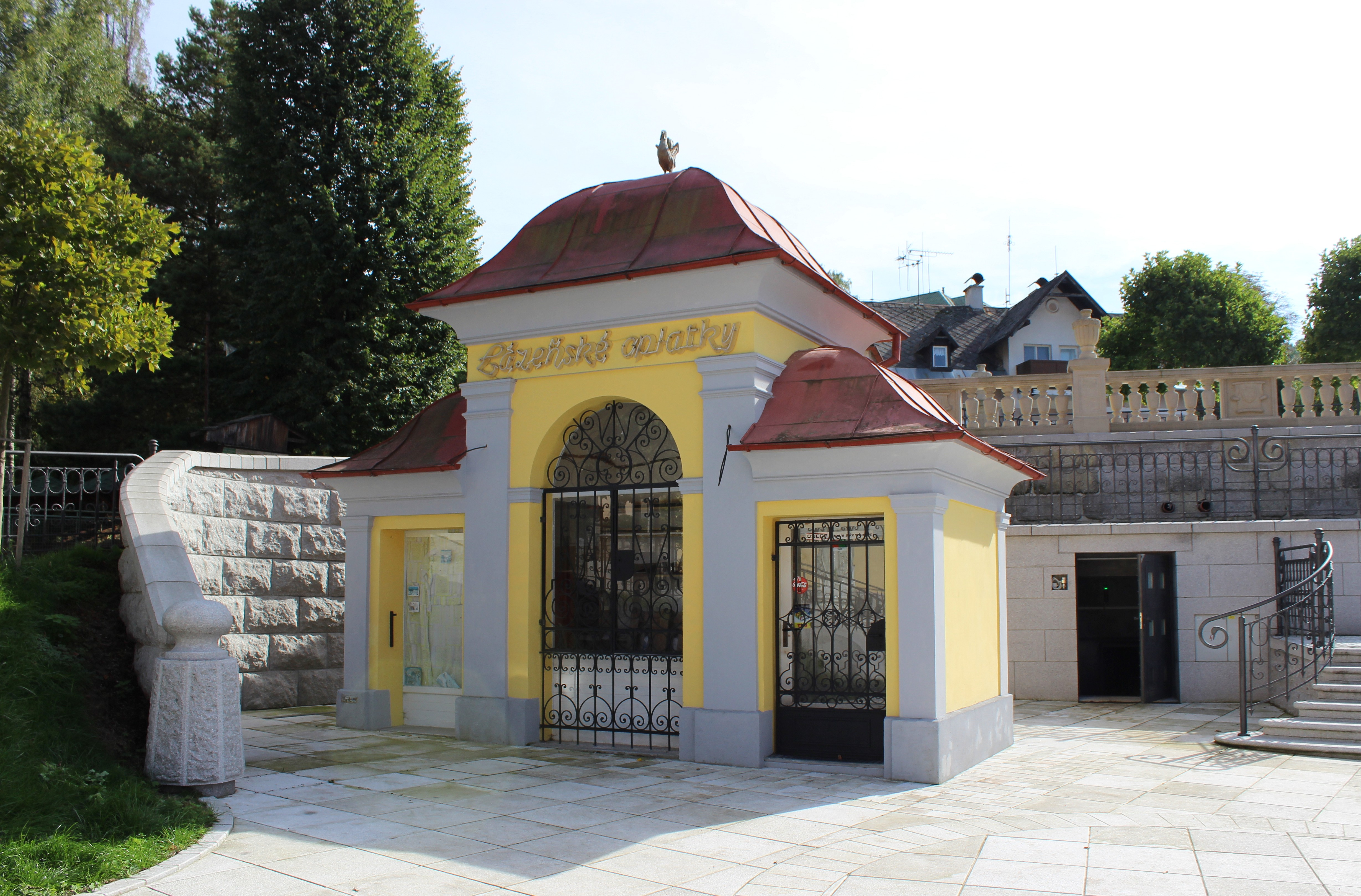 Bývalá prodejna oplatek na kolonádě v Lázních Libverdě.